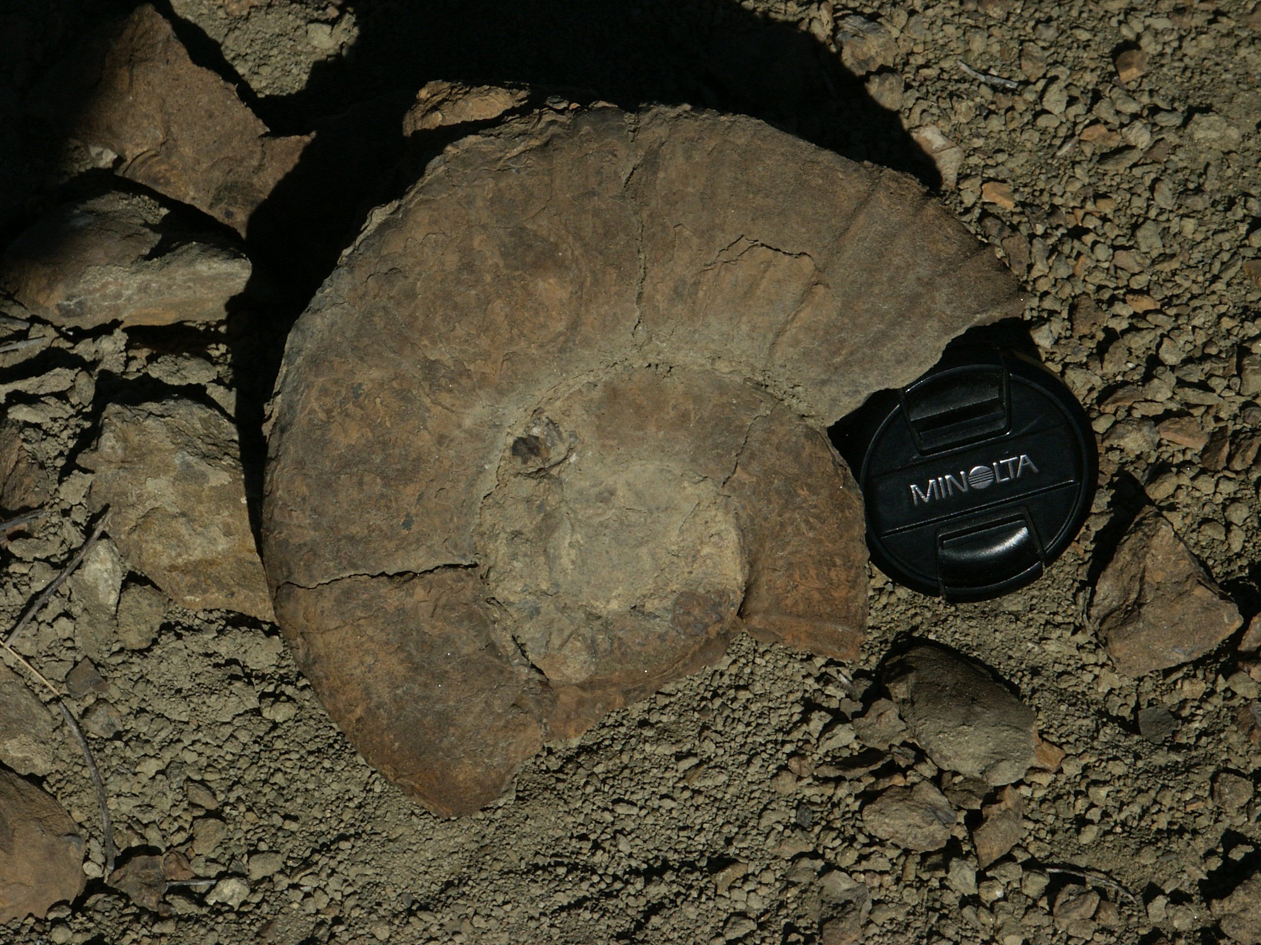 Espécimen de Ammonite crioceratítido de la Formación Agrio (Cuenca Neuquina) en Argentina